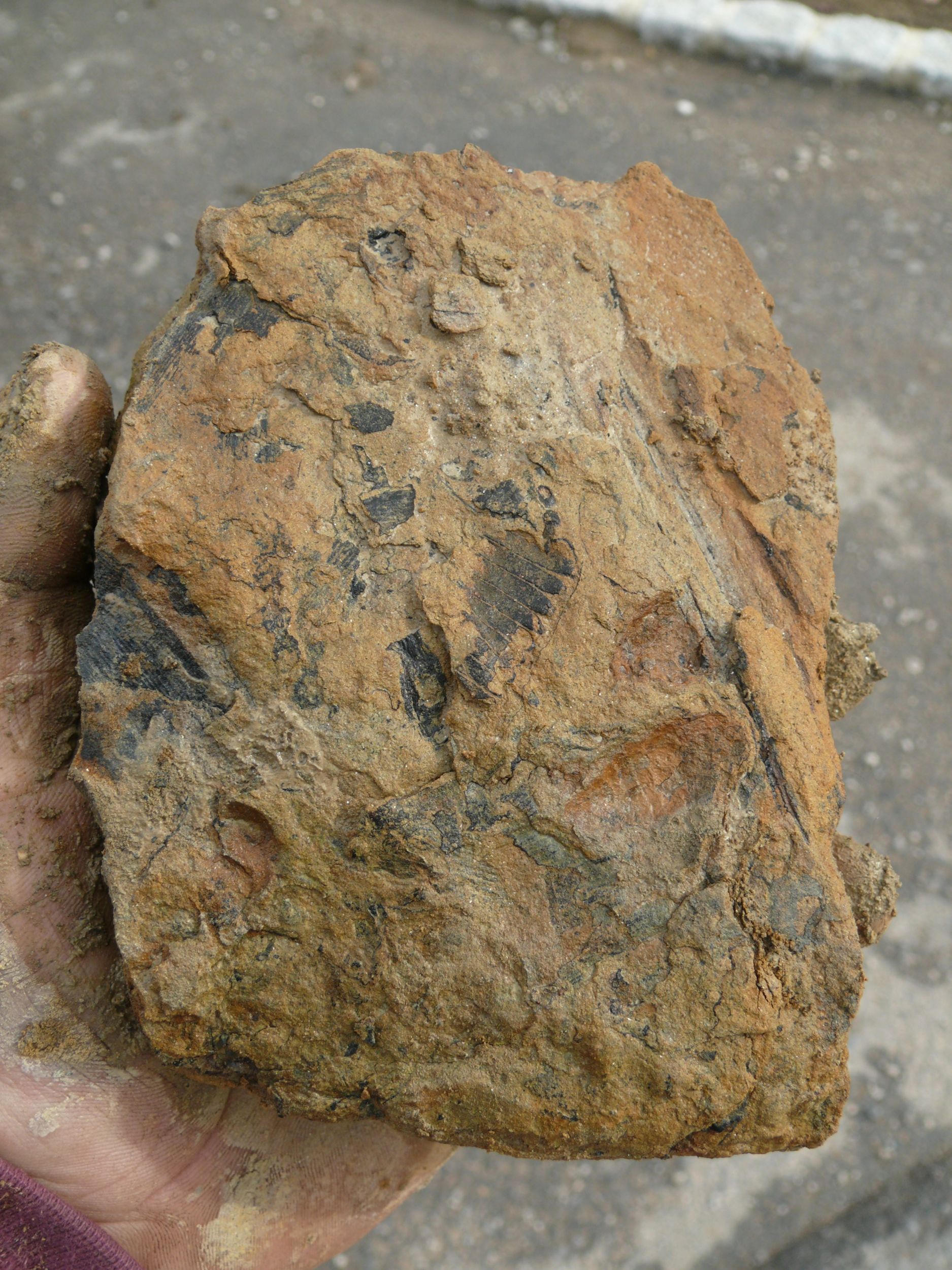 Sandstein mit Pflanzenresten (Equisetites sp.), Erfurt-Formation, Unterer Keuper, Hohenlohe, Deutschland